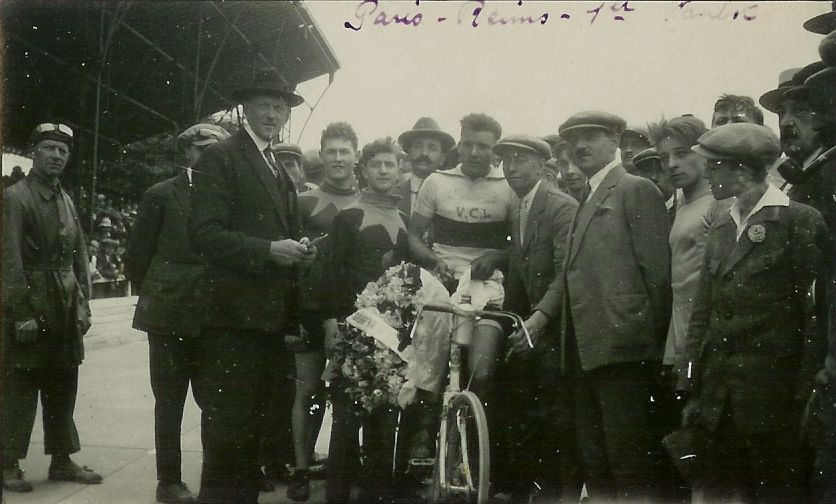 Georges Wambst, vainqueur de Paris Reims 1925, arrivée au vélodrome de la Haubette, entourés de coureurs du Bicycle club rémois